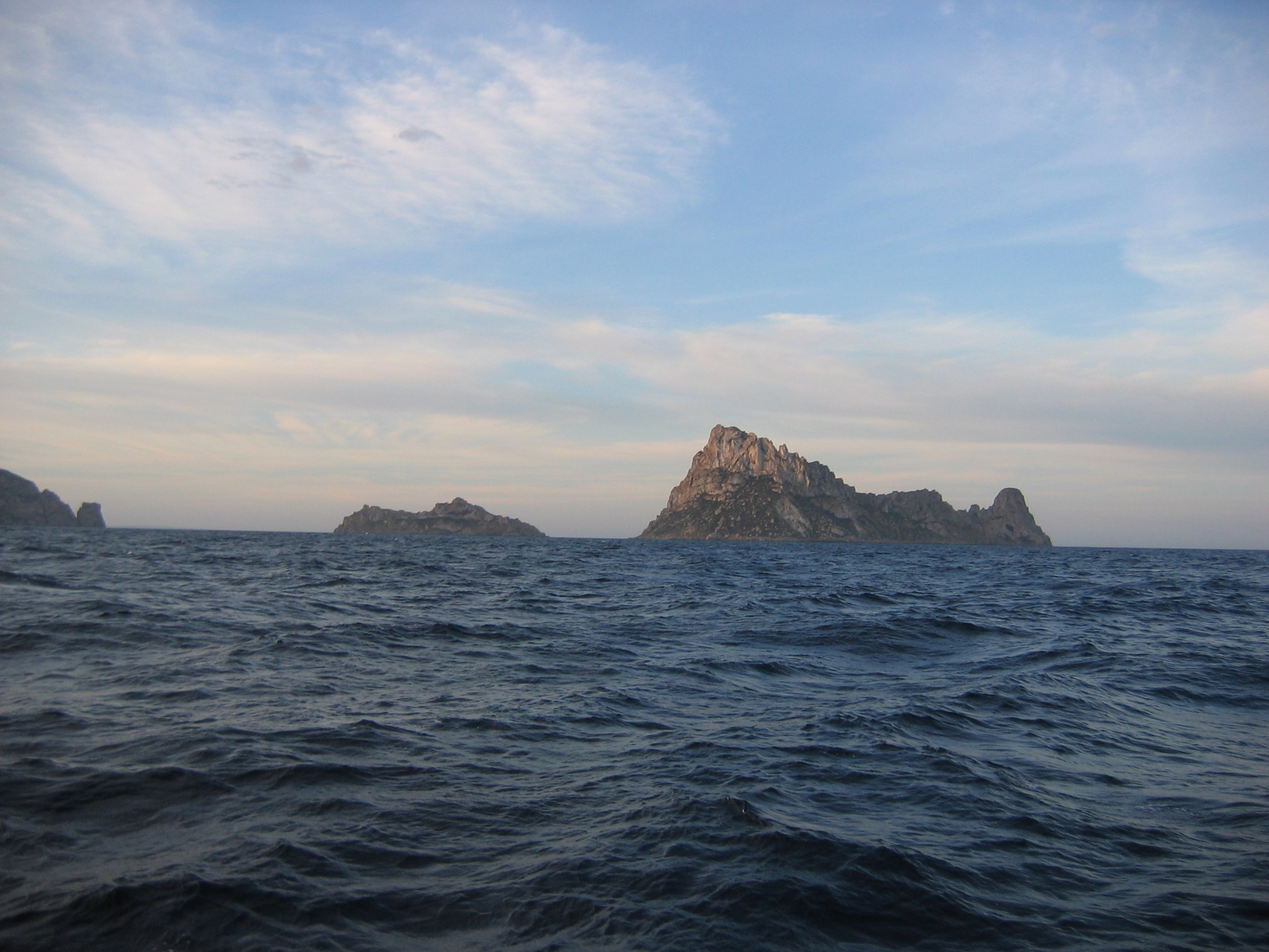 Islas cerca de Ibiza